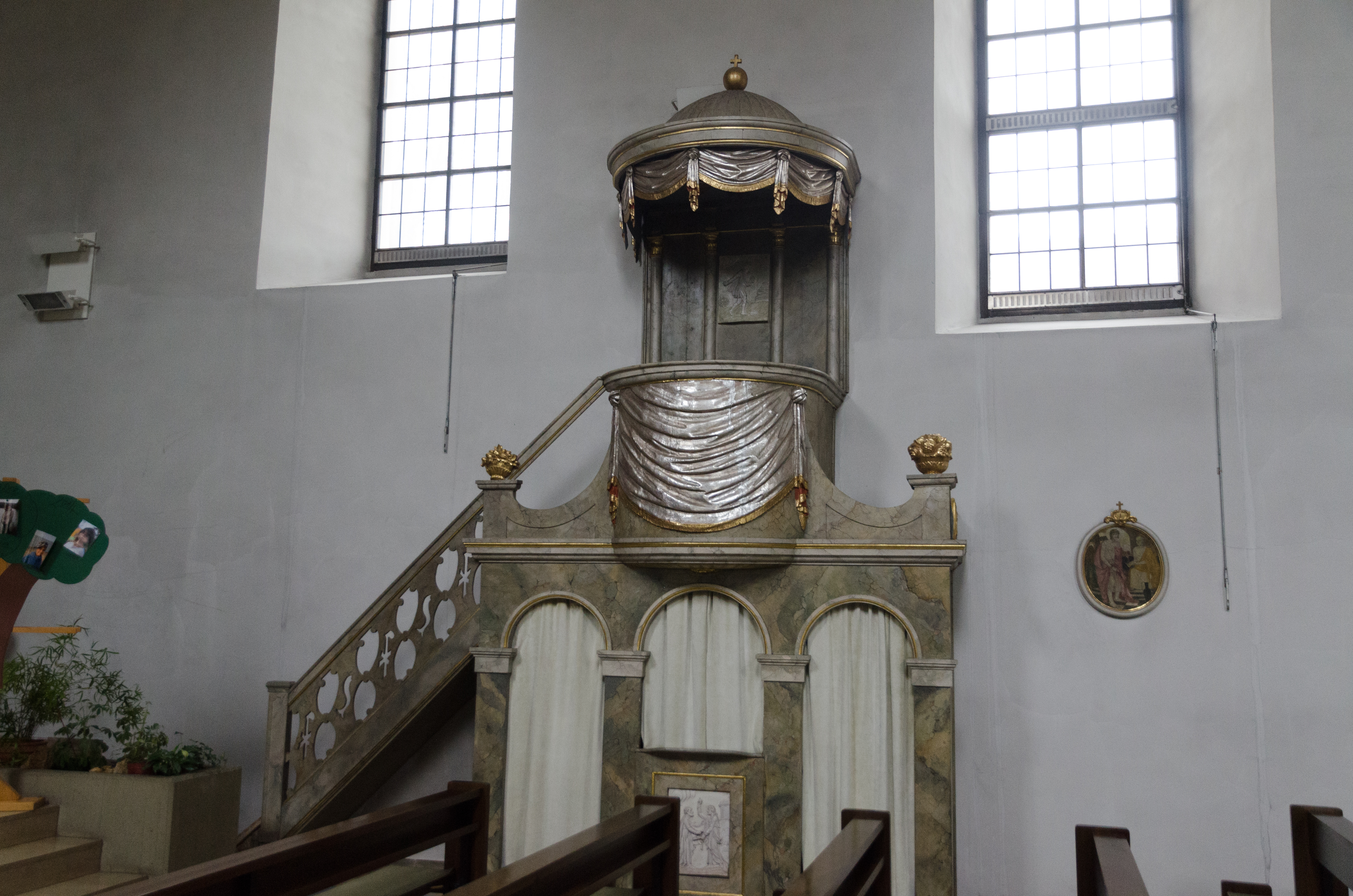 Kath. Kirche St. Laurentius in Thundorf in Unterfranken